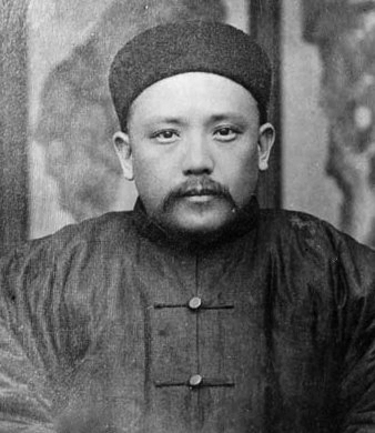 这是驻扎朝鲜总理交涉事宜、领三品衔之袁世凯